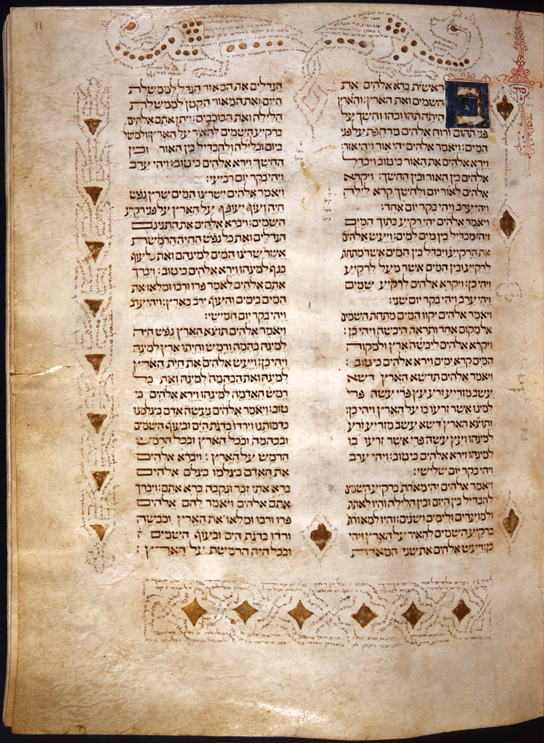 Bíblia de Cervera, Génesis (fl 11)